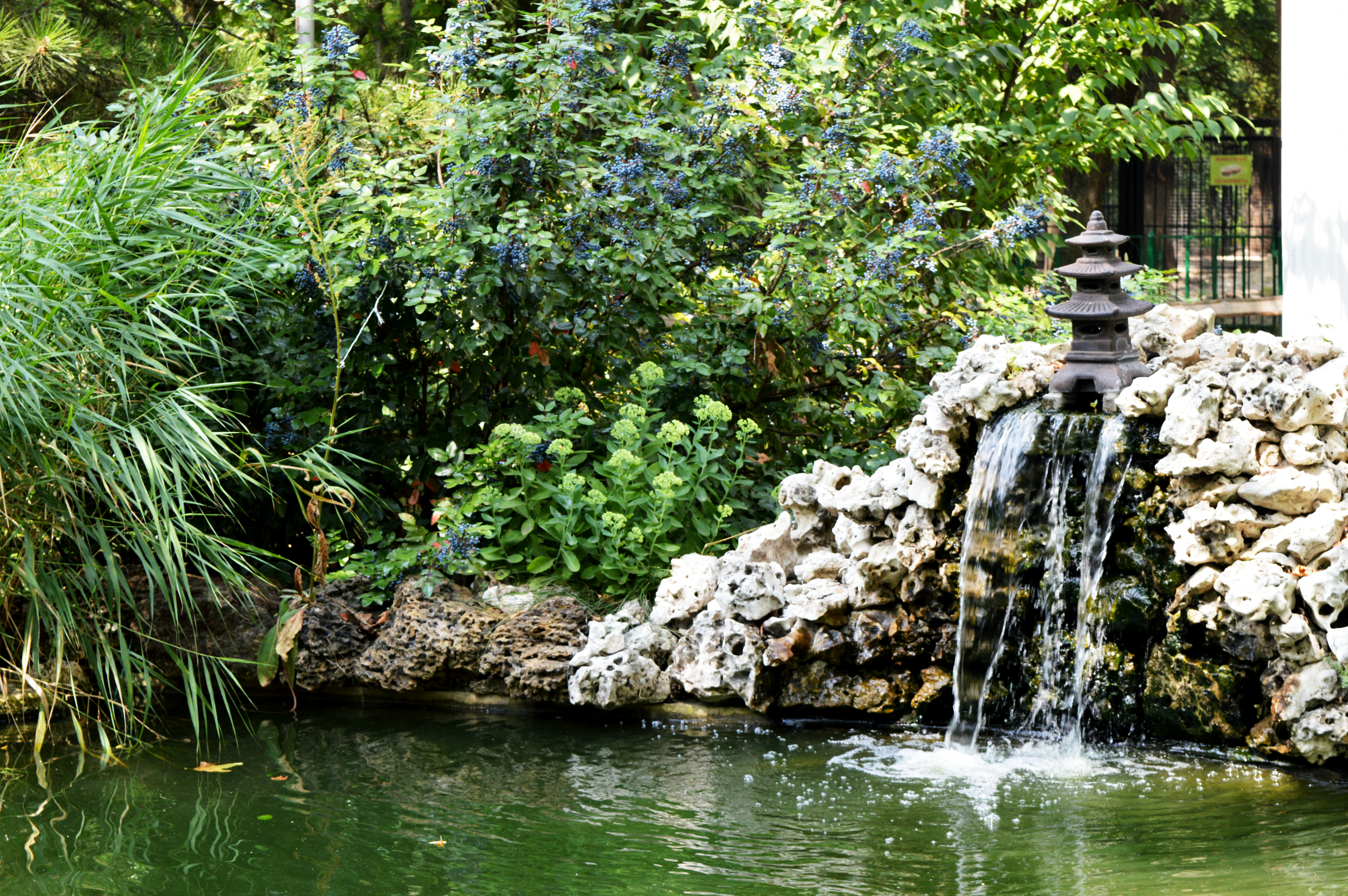 Миколаївський зоопарк, м. Миколаїв